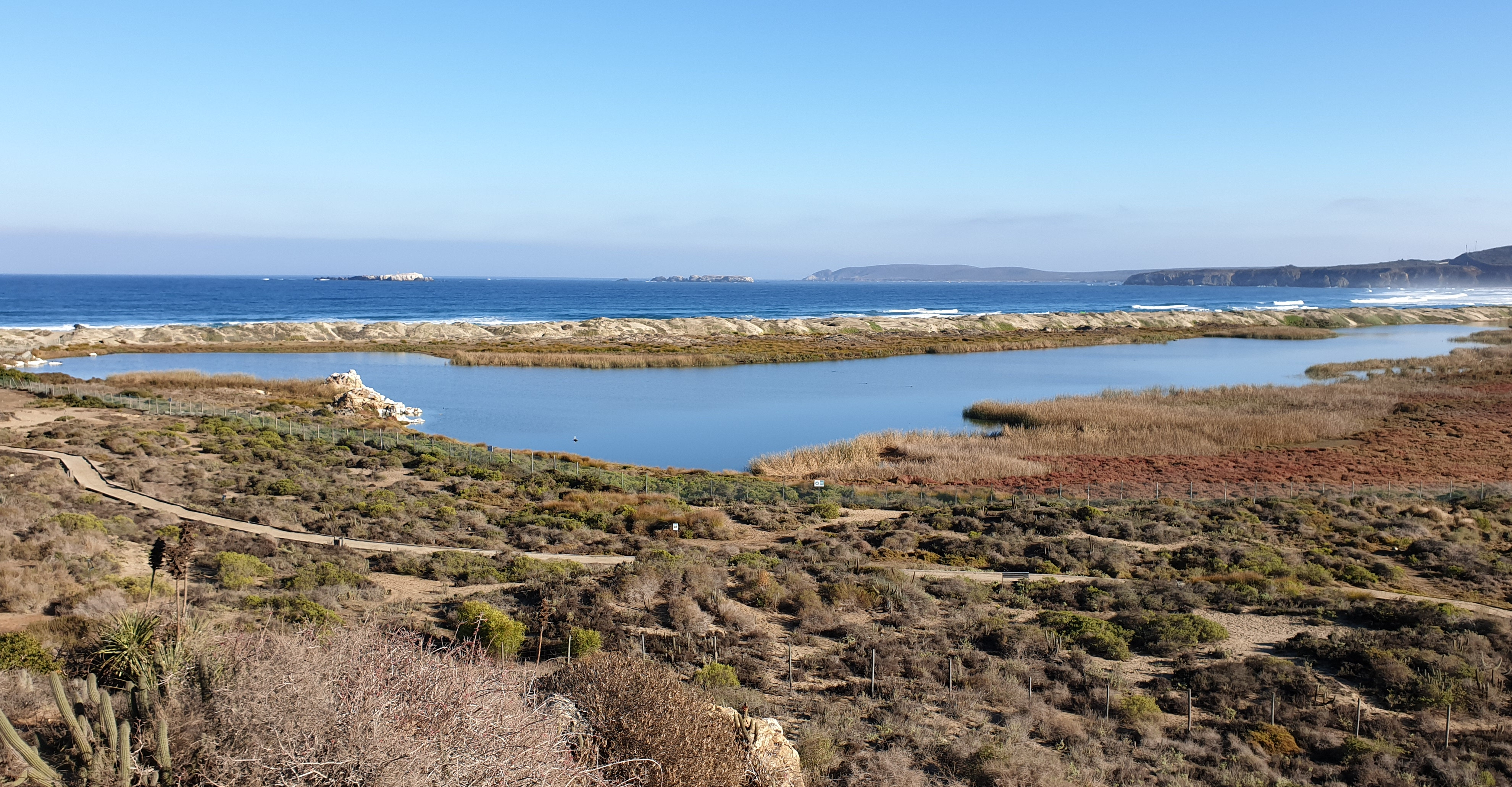 Los Vilos, Coquimbo, Chile